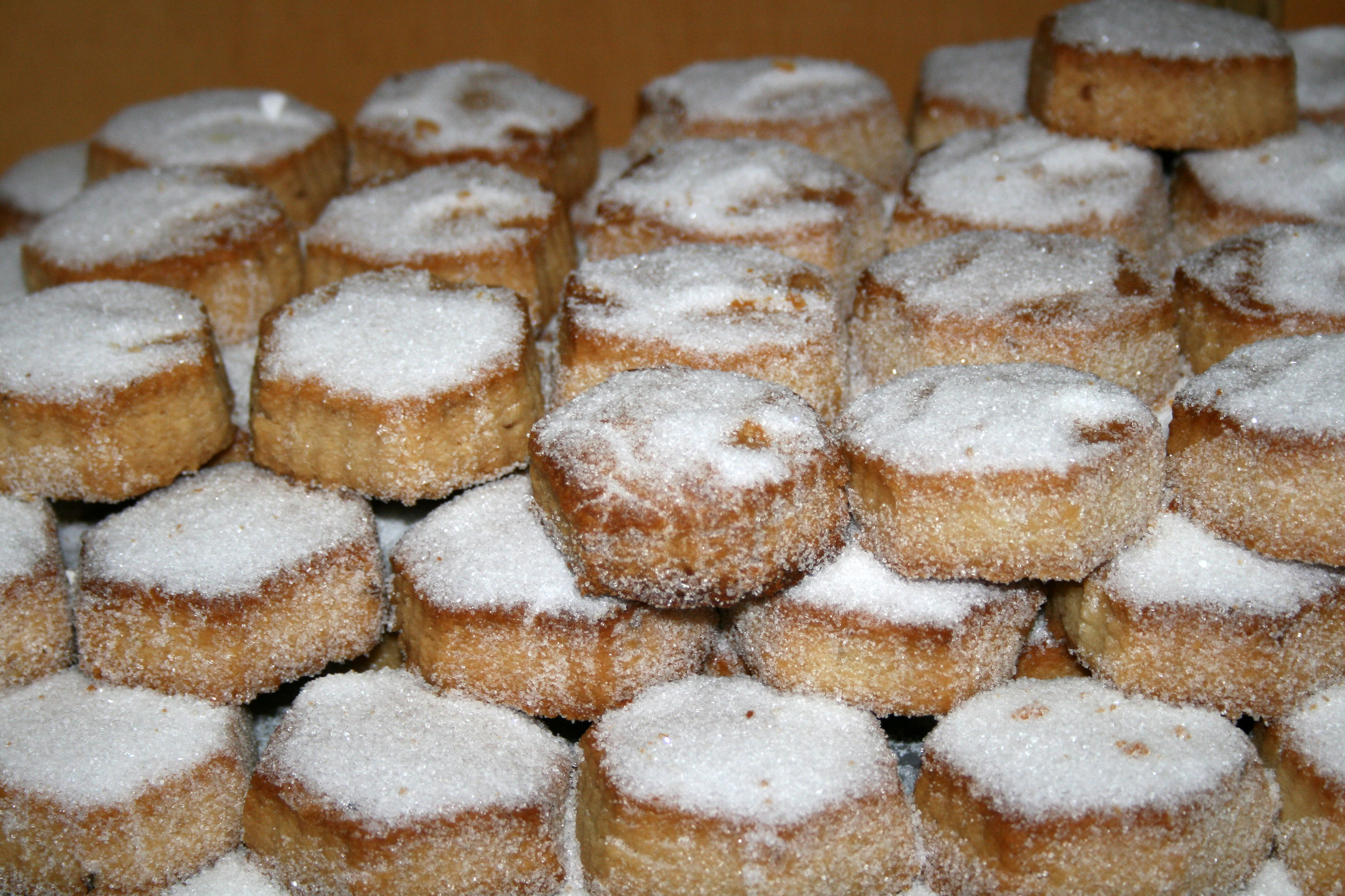 Pastas de Castilla y León (Toro) - Pastas de almedra